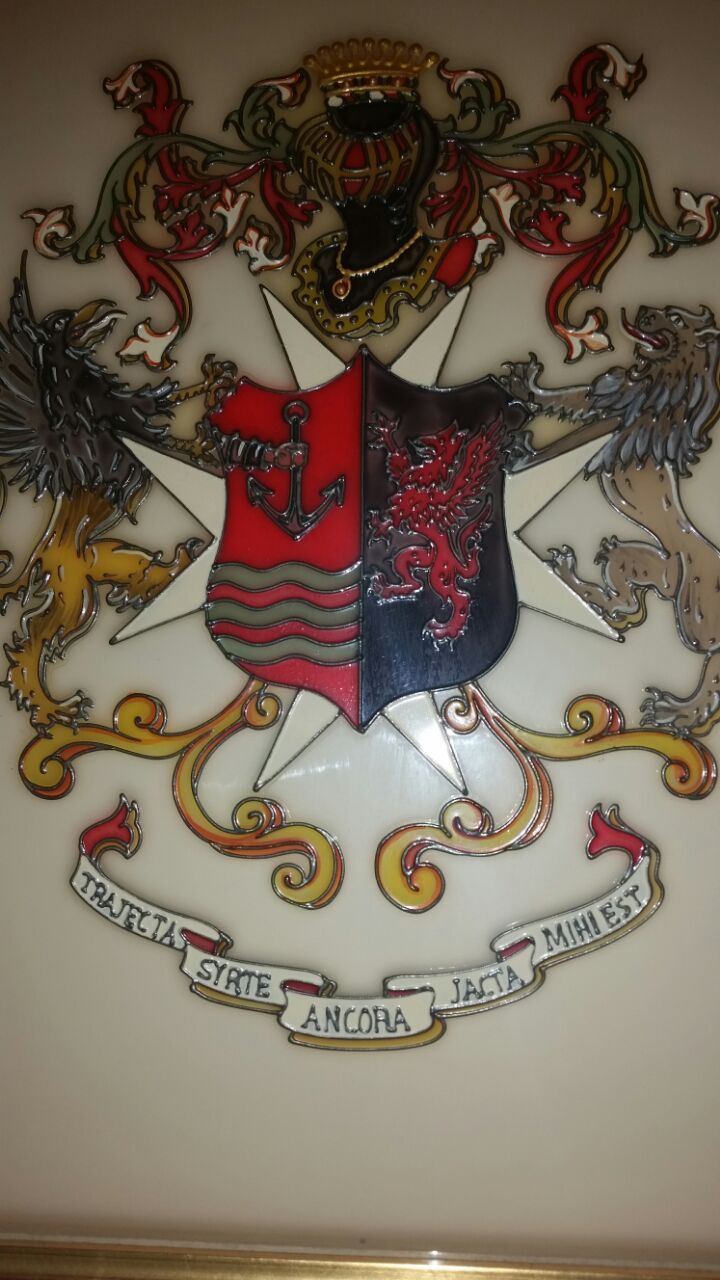 Stemma famiglia Patroni Griffi